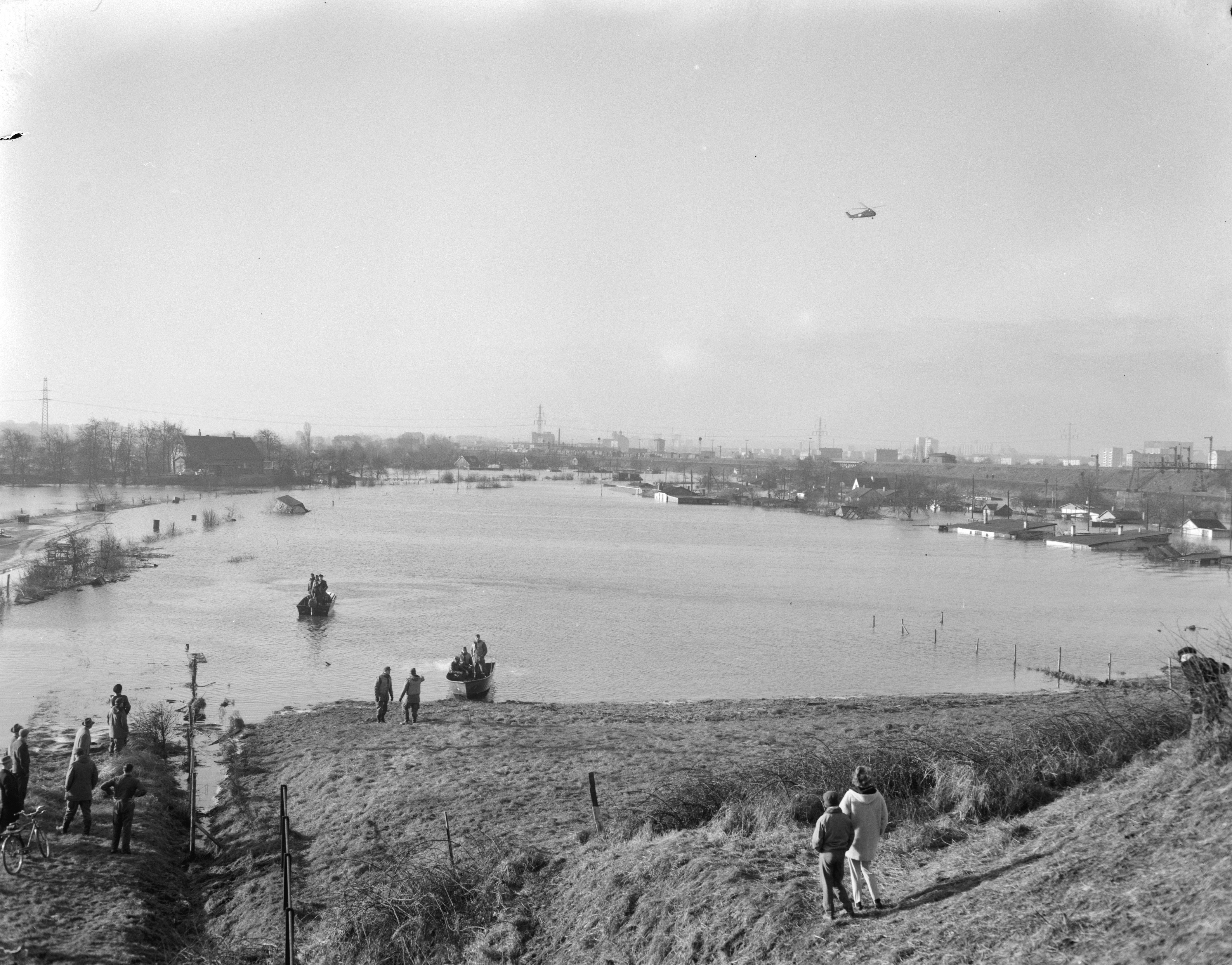 Collectie / Archief : Fotocollectie Anefo Reportage / Serie : [ onbekend ] Beschrijving : Watersnood in Hamburg Datum : 19 februari 1962 Locatie : Hamburg Trefwoorden : WATERSNOOD Fotograaf : Bilsen, Joop van / Anefo Auteursrechthebbende : Nationaal Archief Materiaalsoort : Negatief (zwart/wit) Nummer archiefinventaris : bekijk toegang 2.24.01.04 Bestanddeelnummer : 913-5394